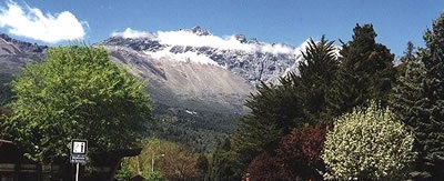 ejemplo